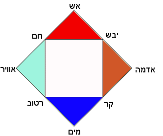 Four elements representation